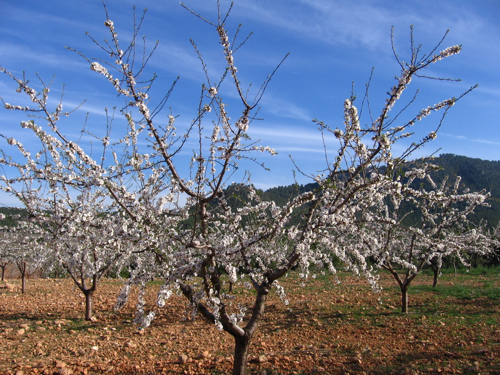 almendro Ferragnes en flor en Cehegín, Murcia, España.